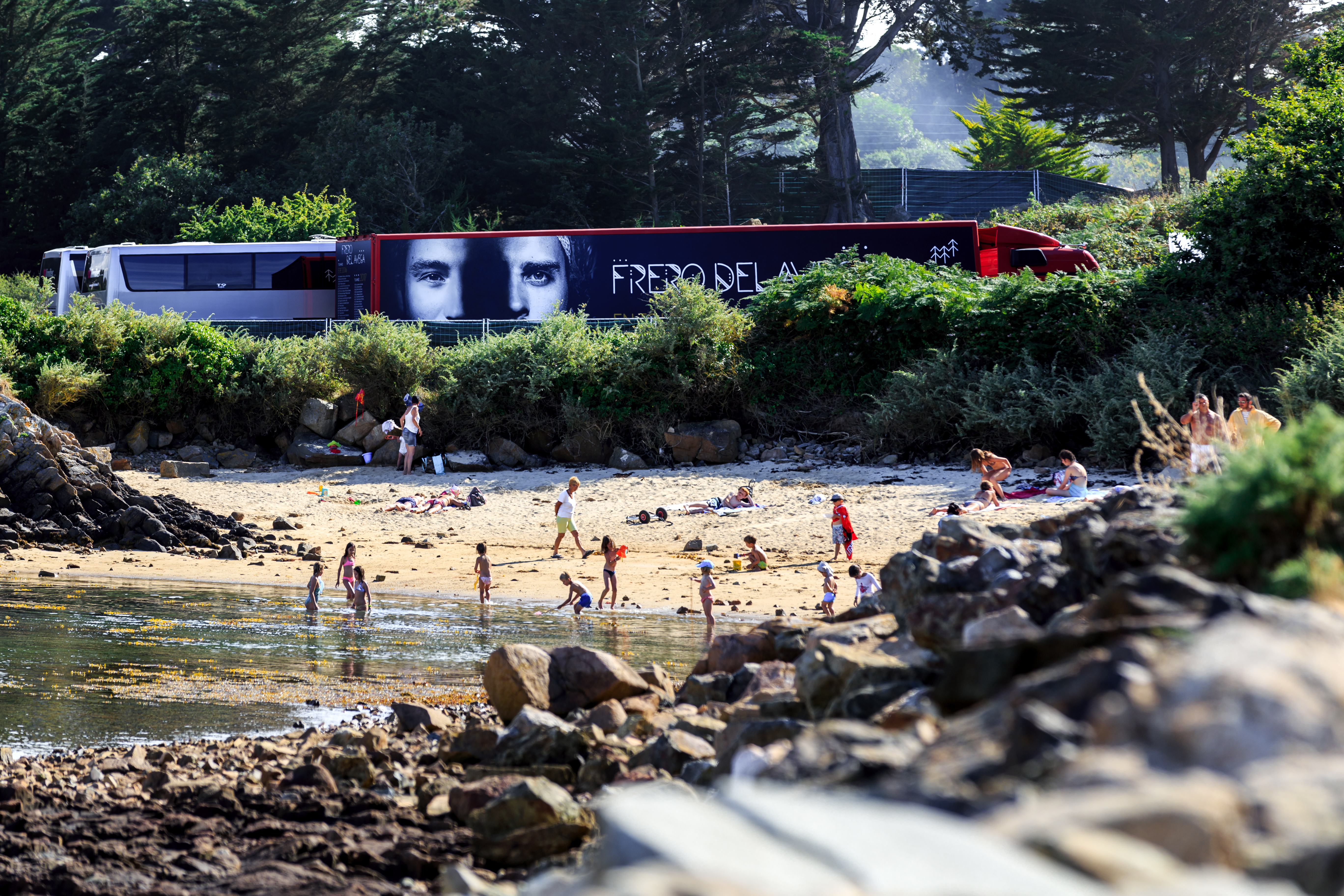 La plage du Bilo derrière la grande scène où se produisent les Fréro Delavega durant le festival de Buguélès le 30 juillet 2016.